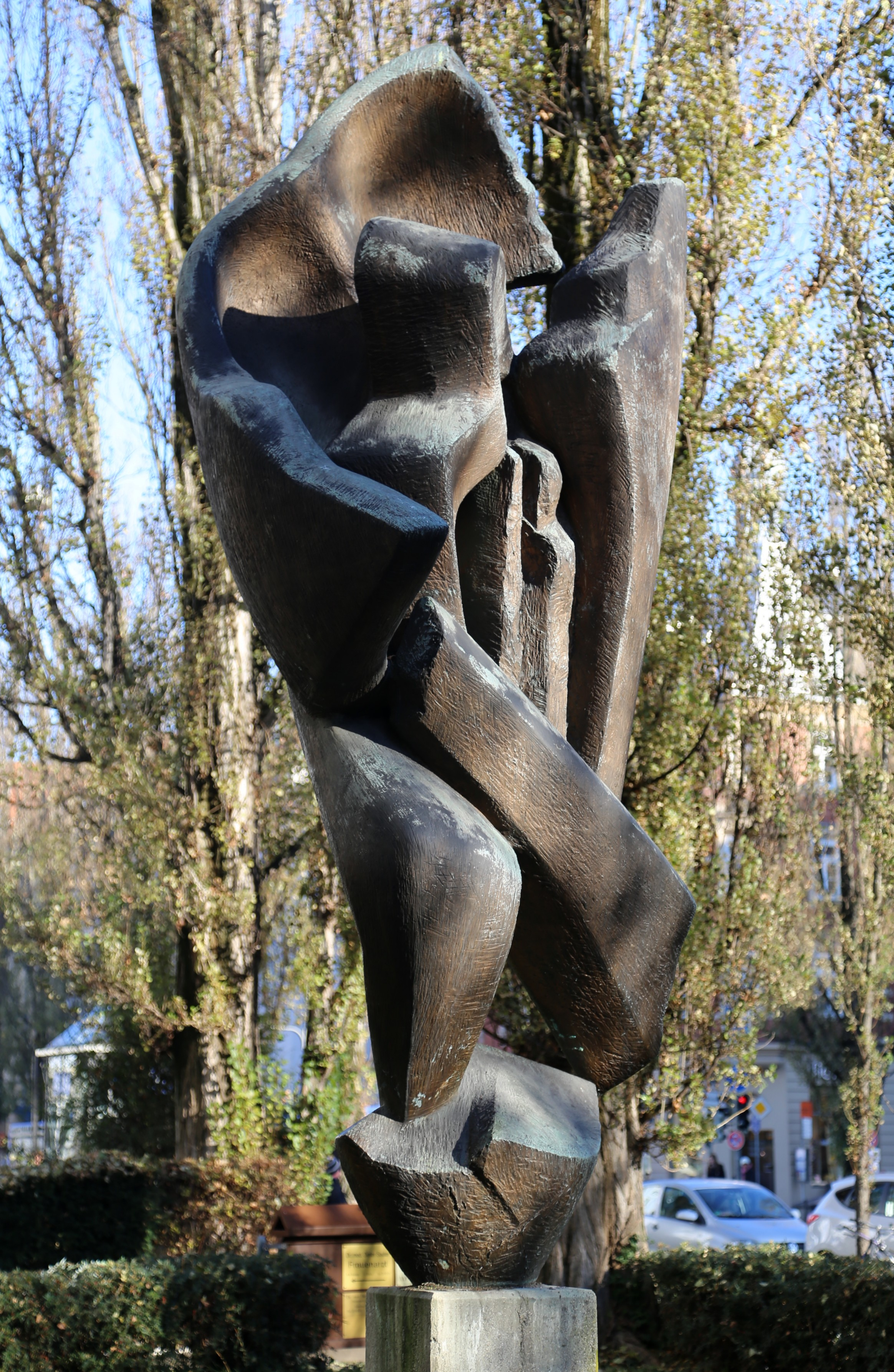 Raoul Ratnowsky: Der Schwere enthoben (1976/77), Bronze, 430 cm hoch (mit Sockel), Leopoldstraße 17, München